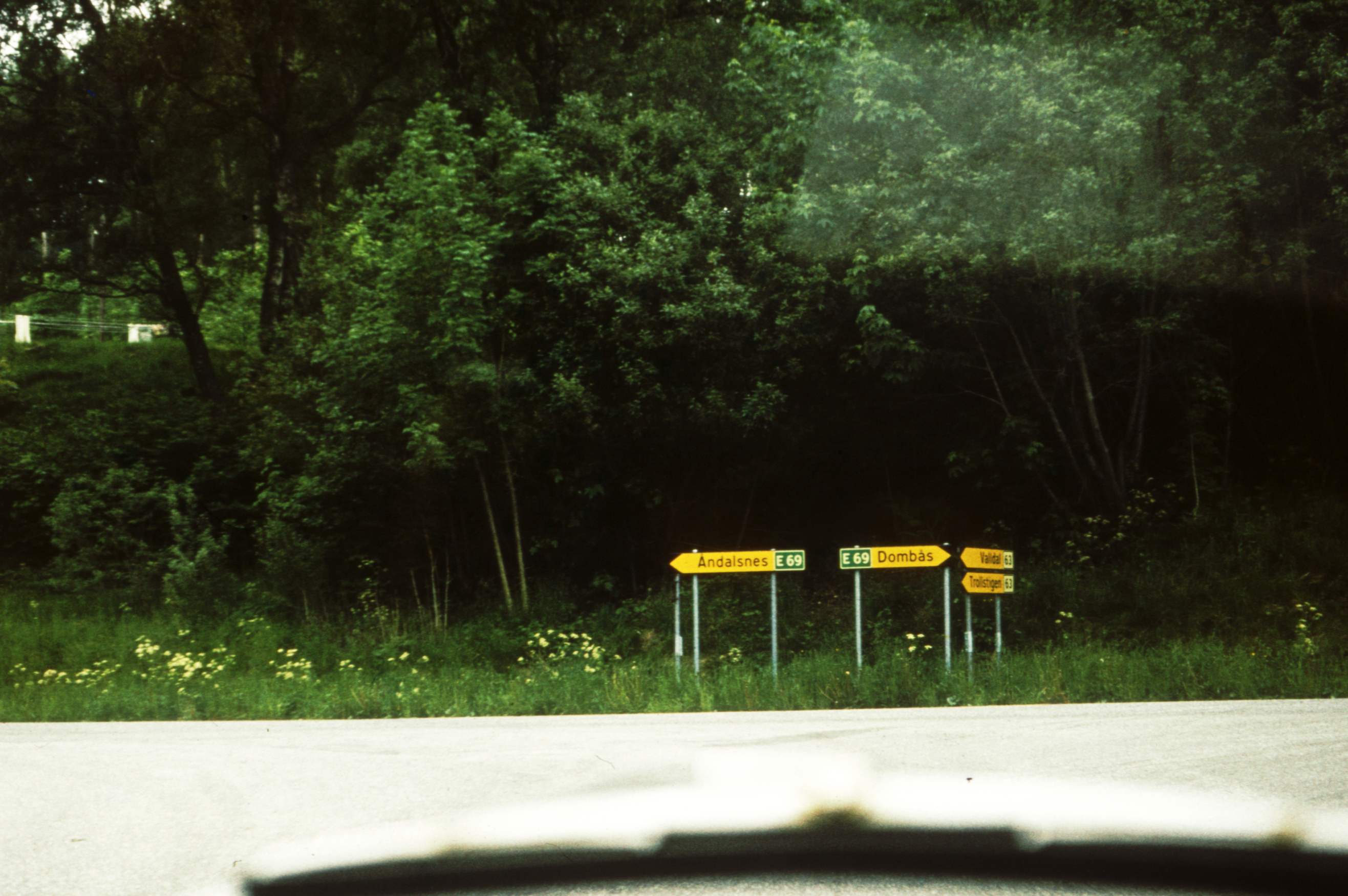 elágazás a város közelében. Location: Norway, Åndalsnes, old E-road numbering Tags: colorful, place-name signs, road signs Title: elágazás a város közelében.